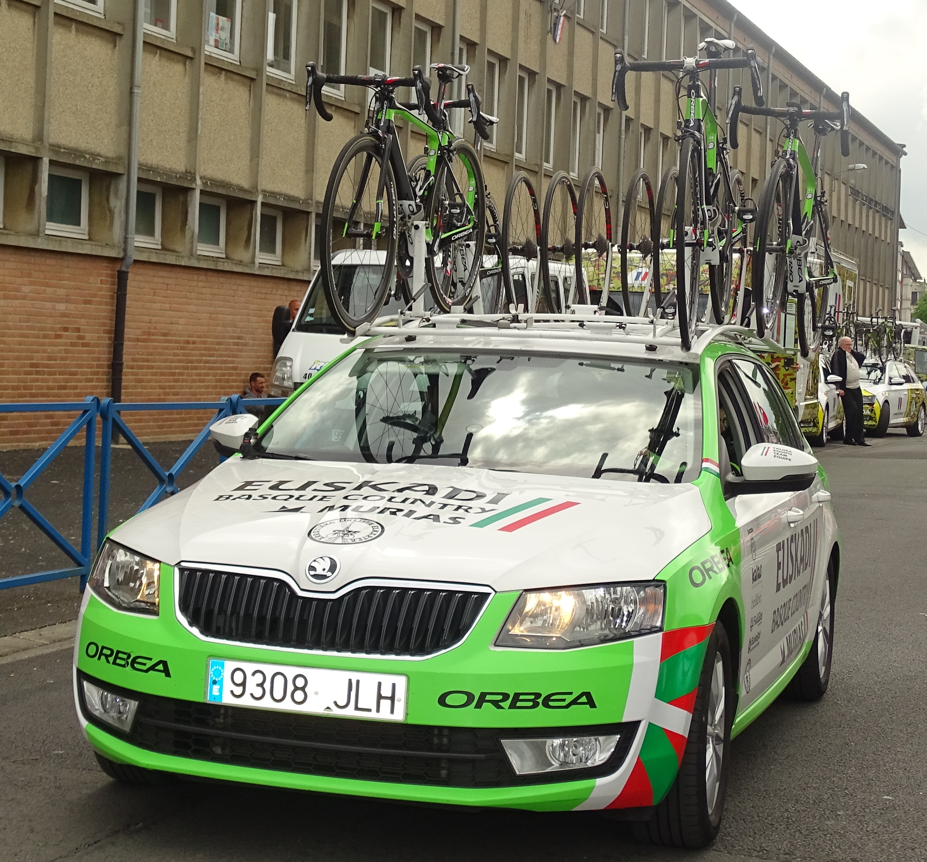 Reportage réalisé le vendredi 20 mai 2016 à l'occasion du départ de la première étape du Paris-Arras Tour 2016 à Douchy-les-Mines, Nord, Nord-Pas-de-Calais-Picardie, France.